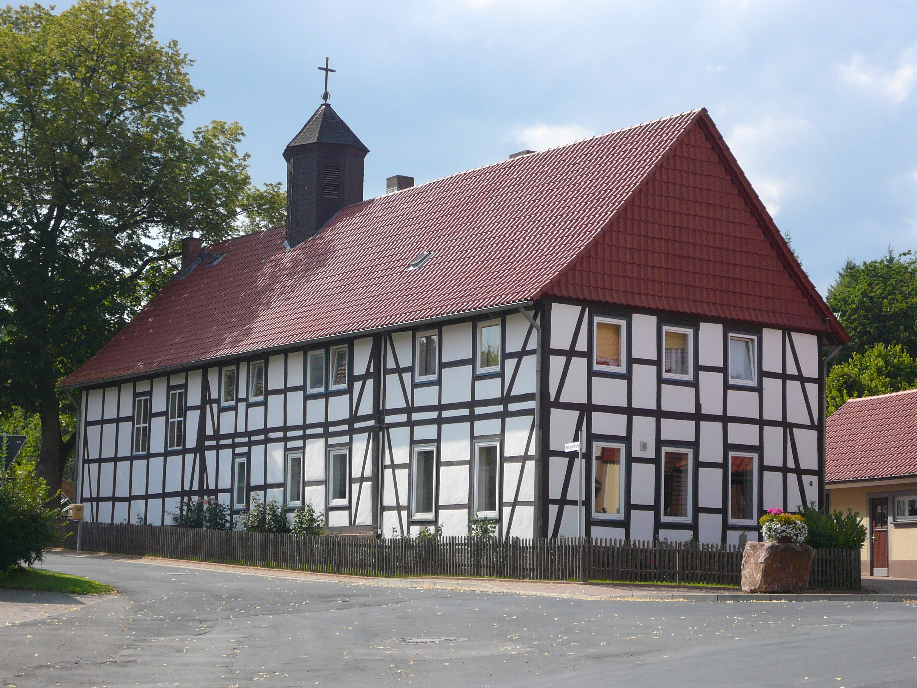 Kapelle und Schulhaus von Espol, Stadt Hardegsen, Landkreis Northeim, Niedersachsen, erbaut 1811, Anbau (vorne) 1882